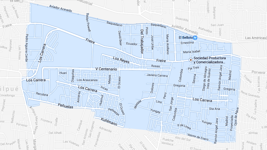 Mapa del barrio Belloto Centro, Comuna de Quilpué, Región de Valparaíso, Chile